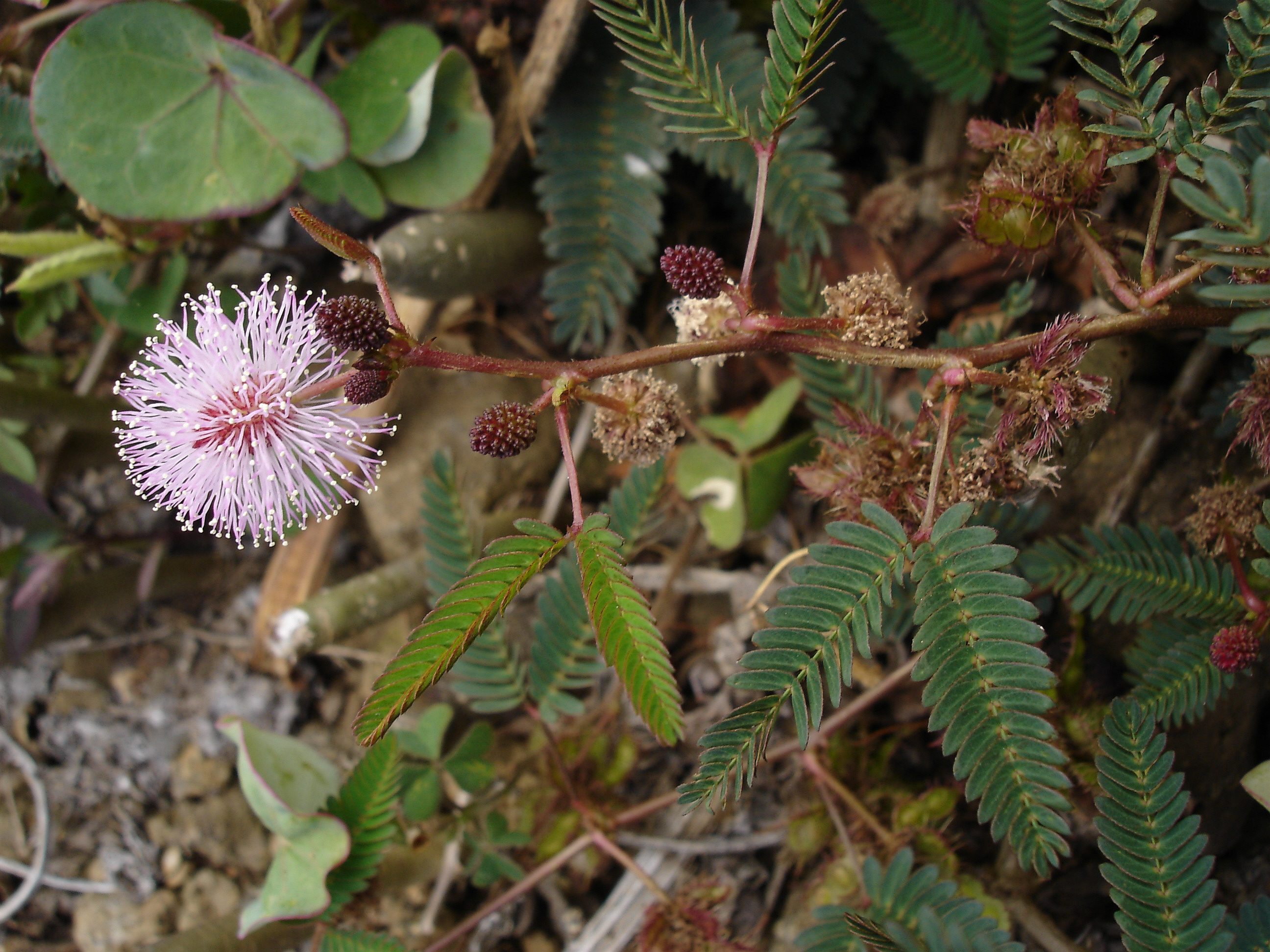 Mimosa pudica du Conservatoire botanique de Mascarin, novembre 2004, La Réunion